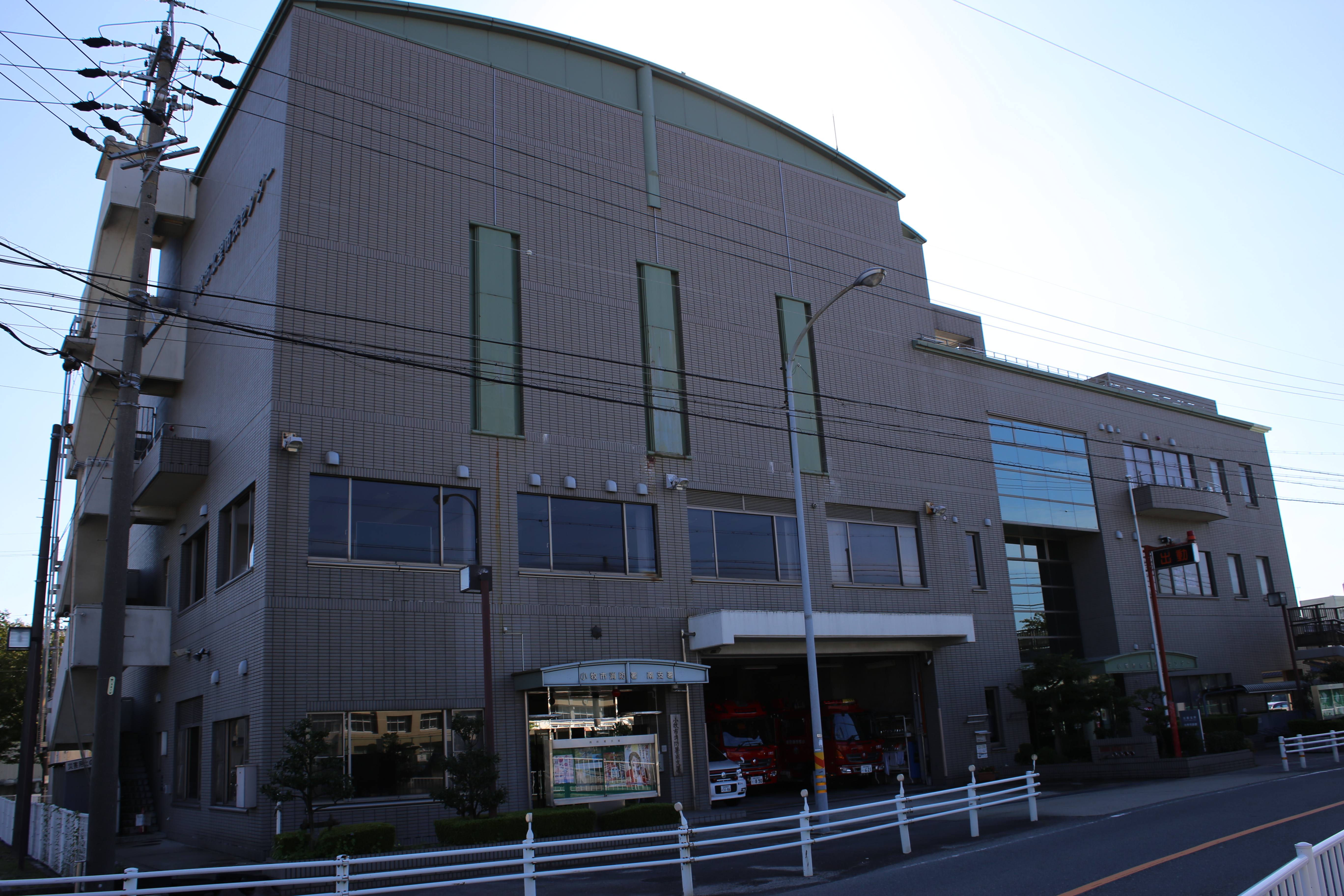 愛知県小牧市下小針中島の小牧市北里市民センター